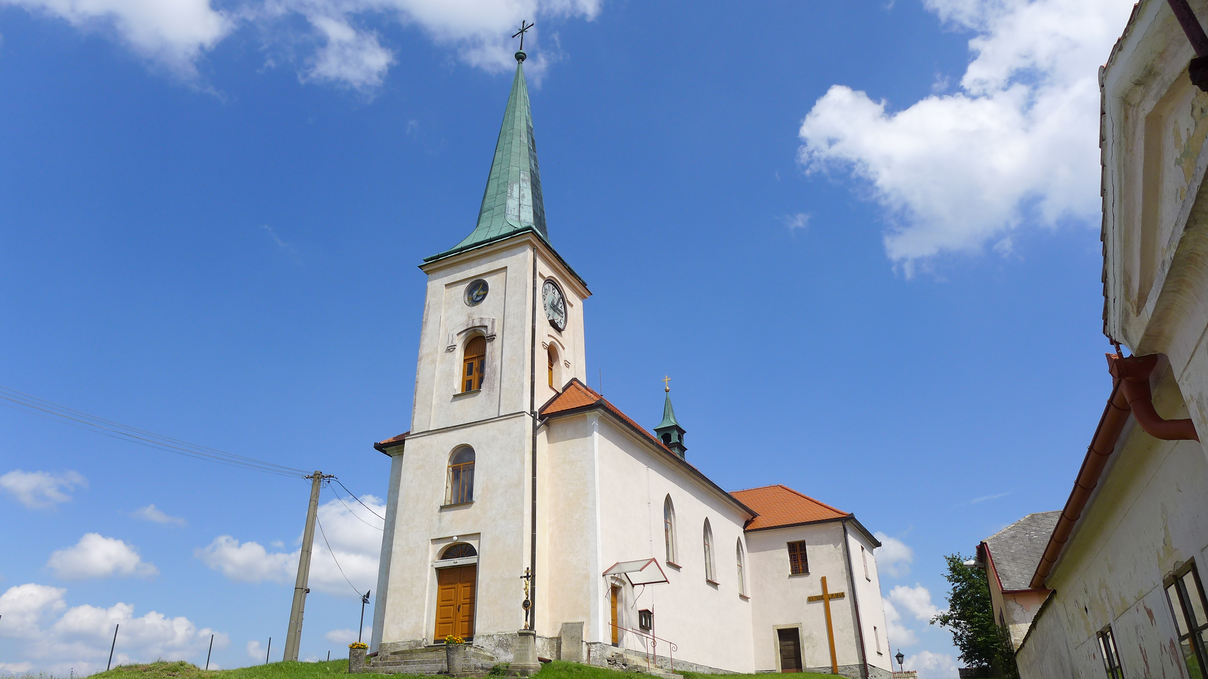 Kostel svatého Václava, návrší na severovýchodním okraji obce, Dlouhá Brtnice.